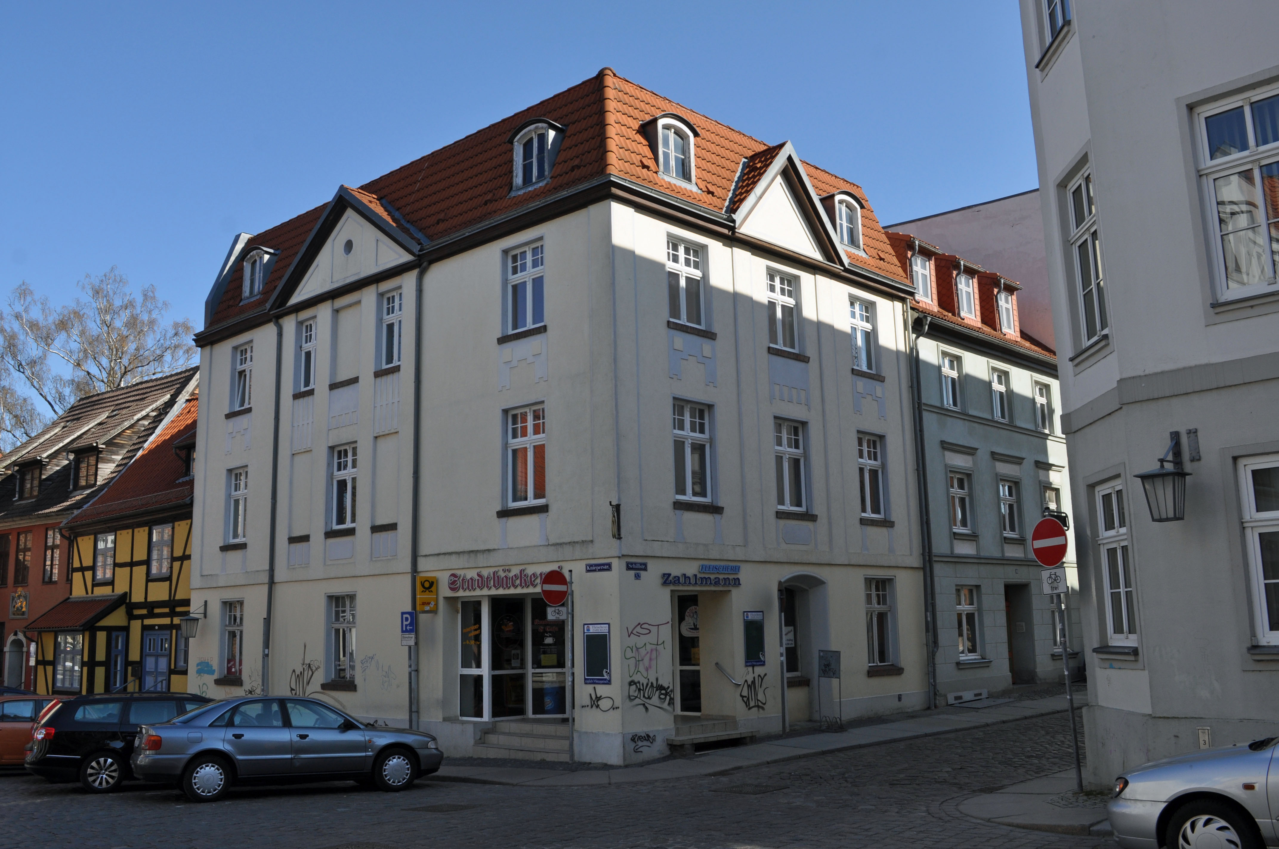 Gebäude bzw. Gebäudedetail in Stralsund. Straße und Hausnummer siehe Dateiname.